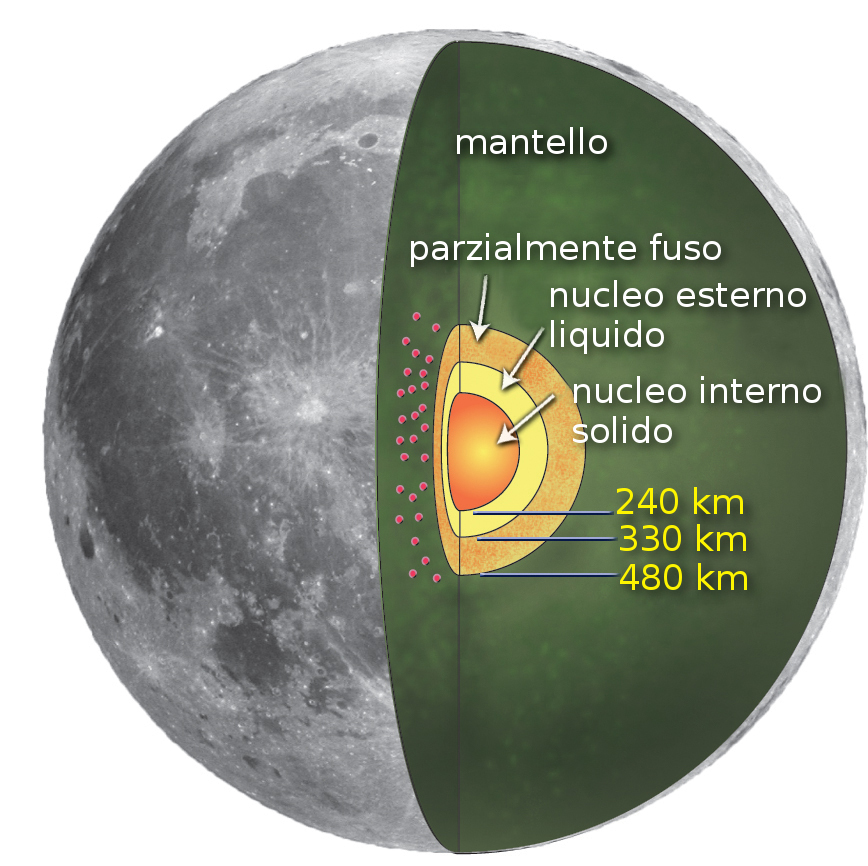 Mappa dell'interno della Luna